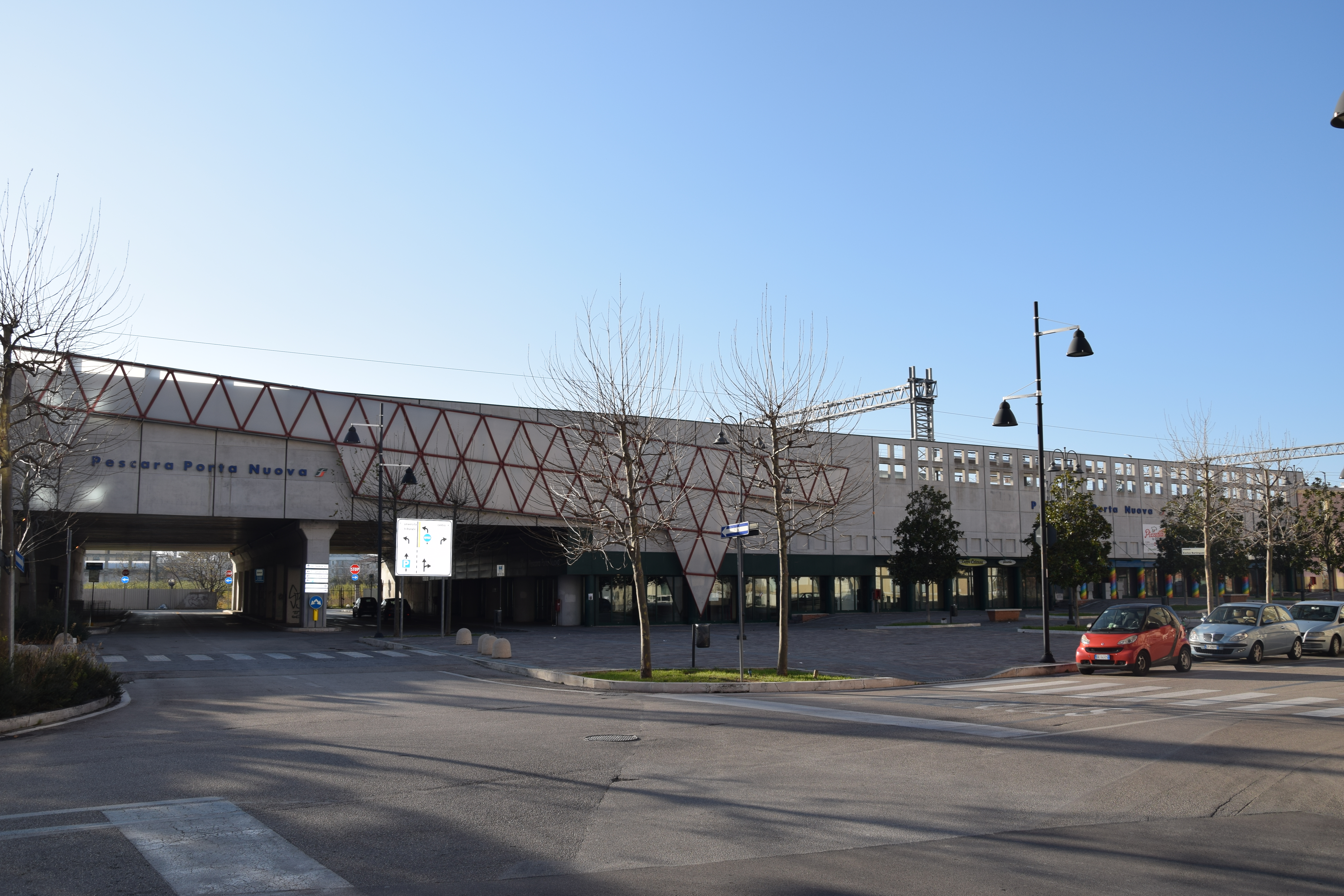 Sottopasso Stazione Pescara Porta Nuova